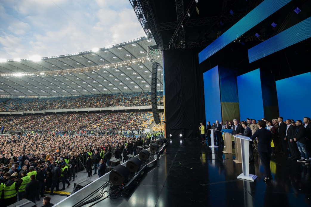 Дебаты кандидатов на пост Президента Украины Петра Порошенко и Владимира Зеленского